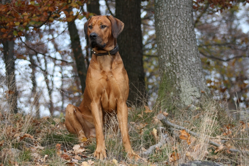 Rhodesian Ridgeback im Wald